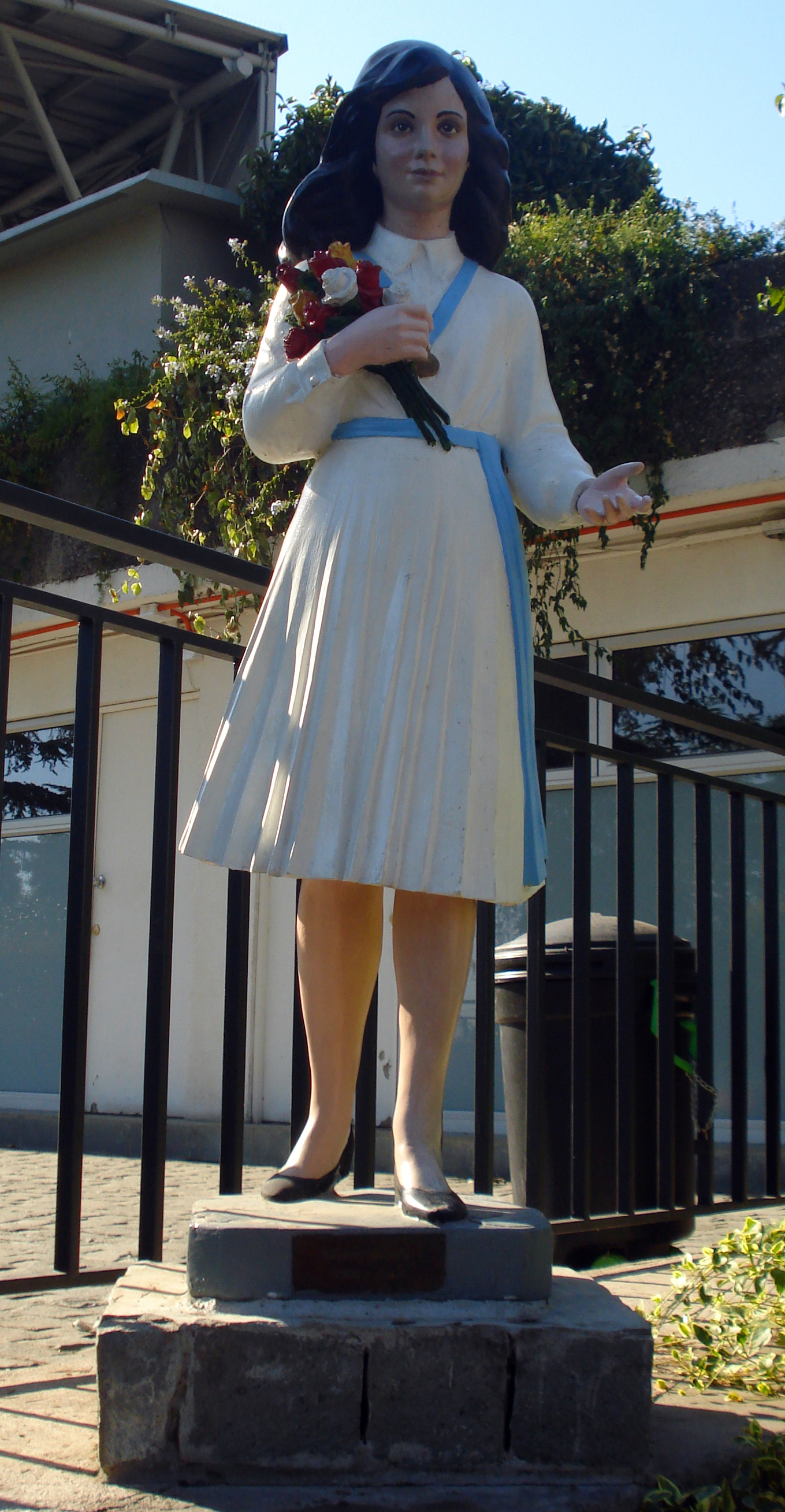 Figura de la beata Laura Vicuña (Santiago de Chile, 5 de abril de 1891 –Junín de los Andes, Argentina, 22 de enero de 1904), ubicada en el Santuario del cerro San Cristobal en Santiago de Chile